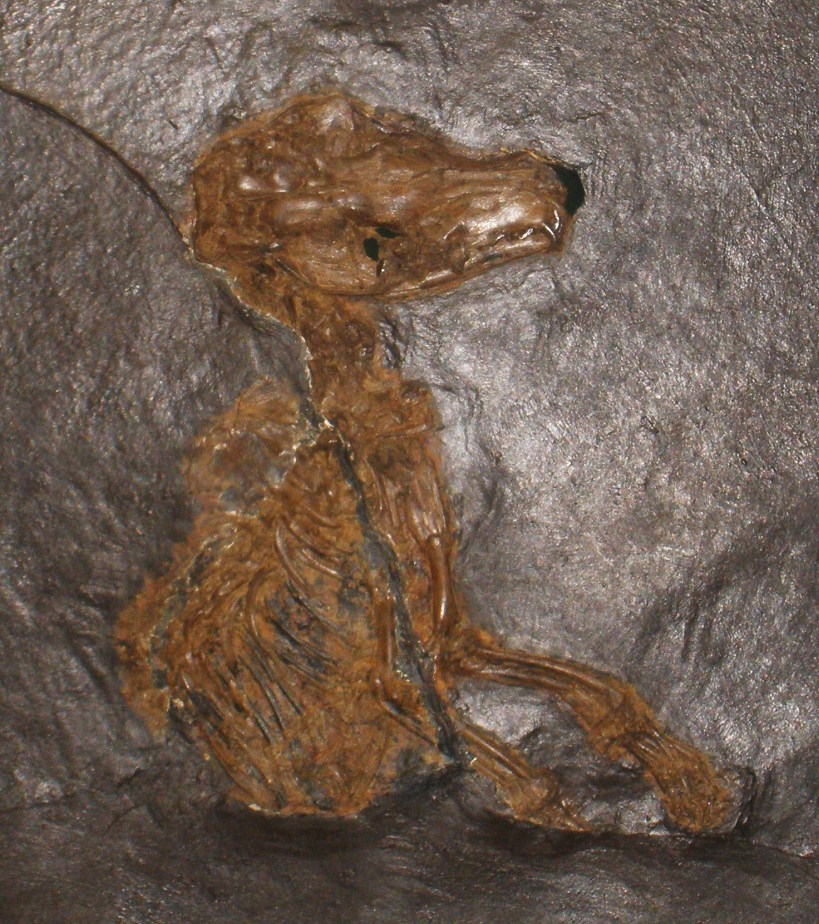 Fossil of Lesmesodon, an extinct mammal- Took the photo at Senckenberg Museum of Frankfurt